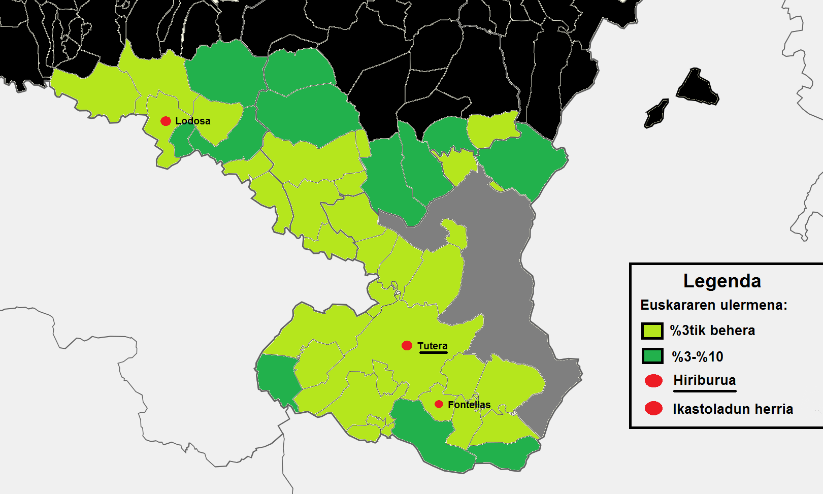 Erriberako euskararen ulermena azaltzen duen mapa linguistikoa, datuak UEMA Atlasetik hartuak.